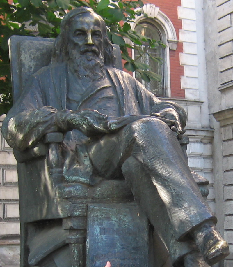 Фото